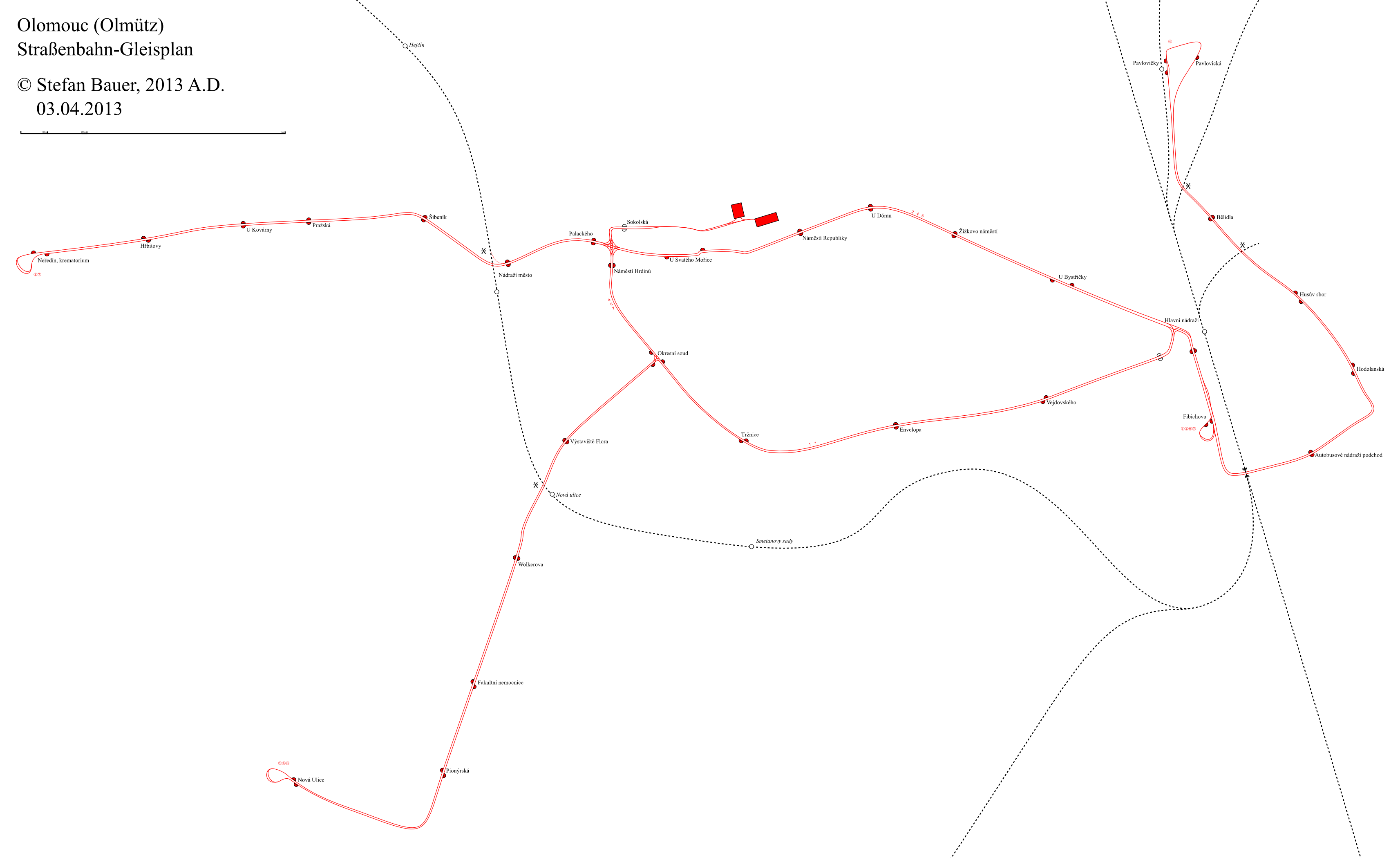 Česky: Kolejová mapa tramvajové sítě v Olomouci 2013